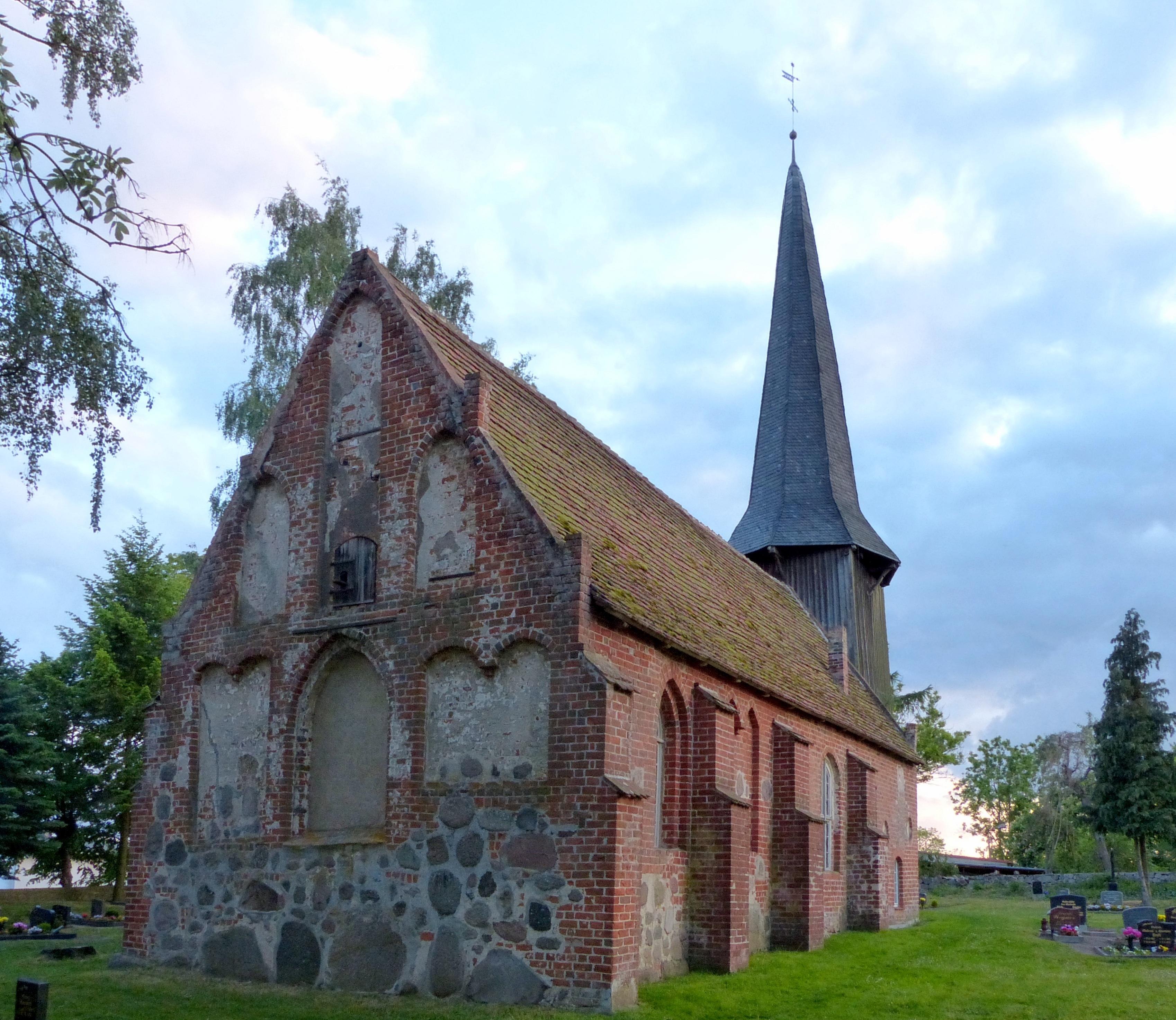 Kirche in Weltzin, Ostgiebel und Nordseite